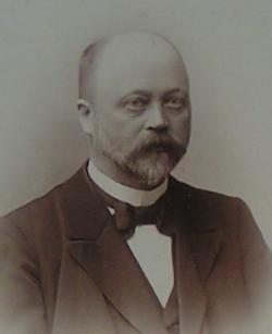 Carl Eitz im Mannesalter